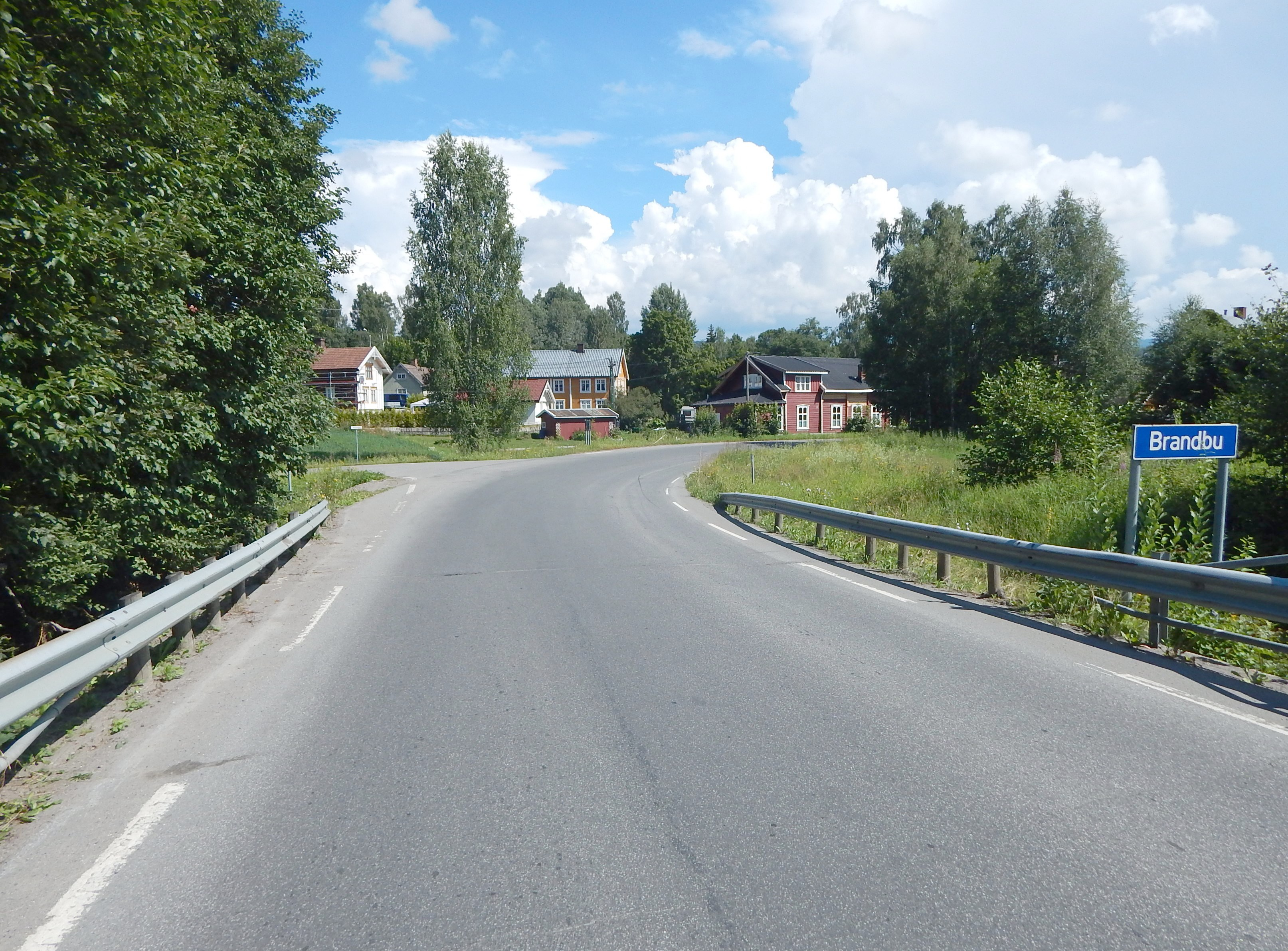 Ringvang bru med fylkesvei 44 på Brandbu